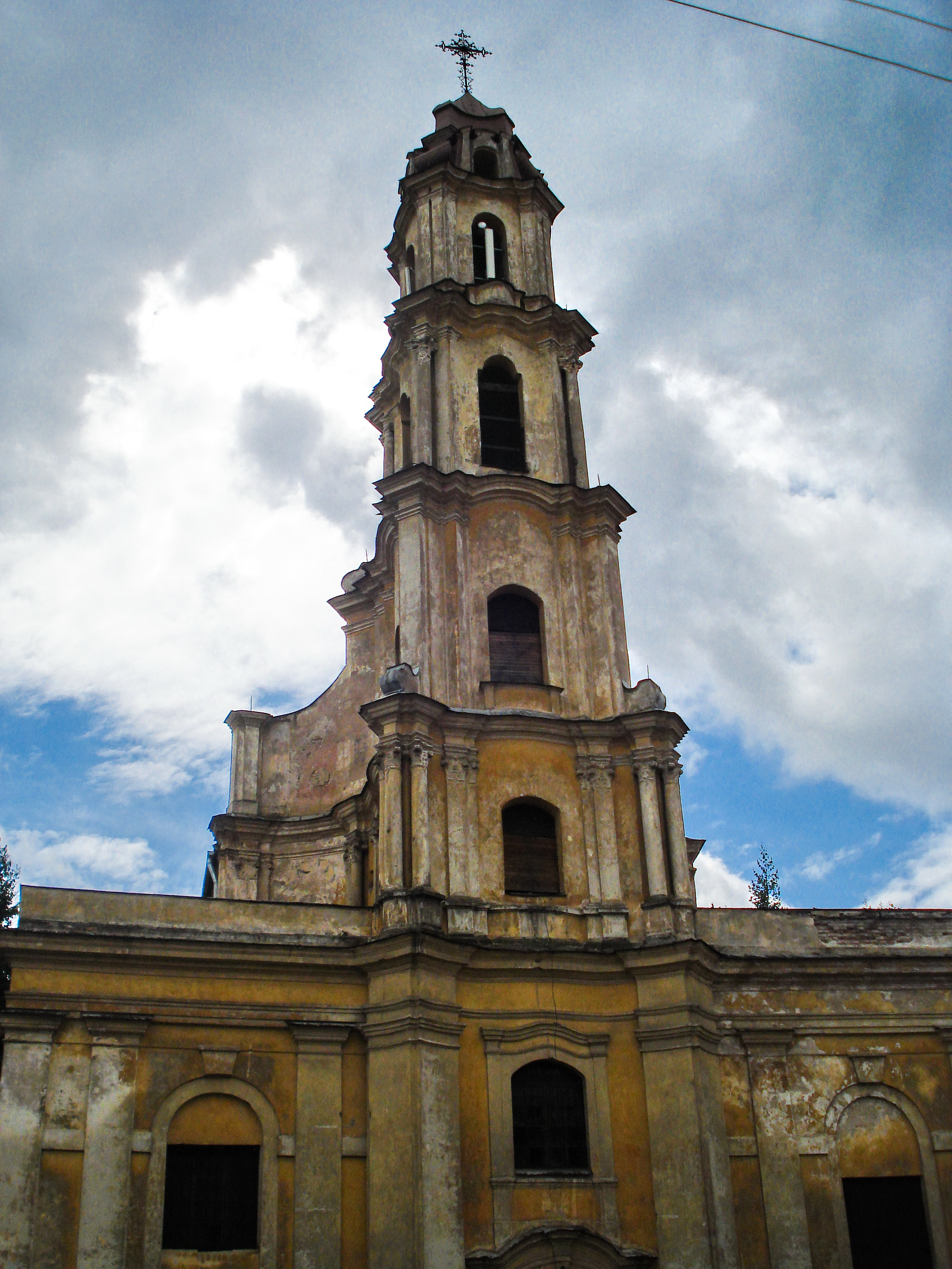 Church of Blessed Virgin Mary (Švč. Mergelės Marijos Ramintojos bažnyčia) in Vilnius (Savičiaus g. 13/2; closed)